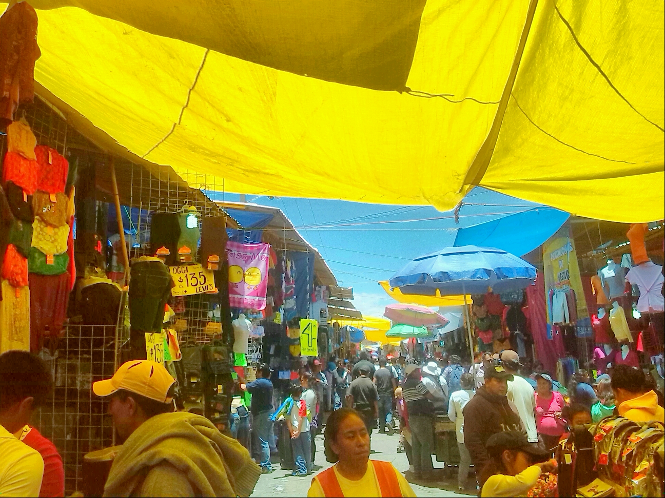 Tianguis de San Martín Texmelucan, Puebla, México